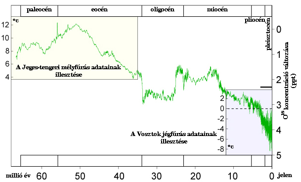 Az utóbbi 65 millió év hőmérsékleti diagramja, O18 koncentráció mérése, a Jeges-tengeri mélyfúrás és a Vosztok-jégfúrás adatai alapján